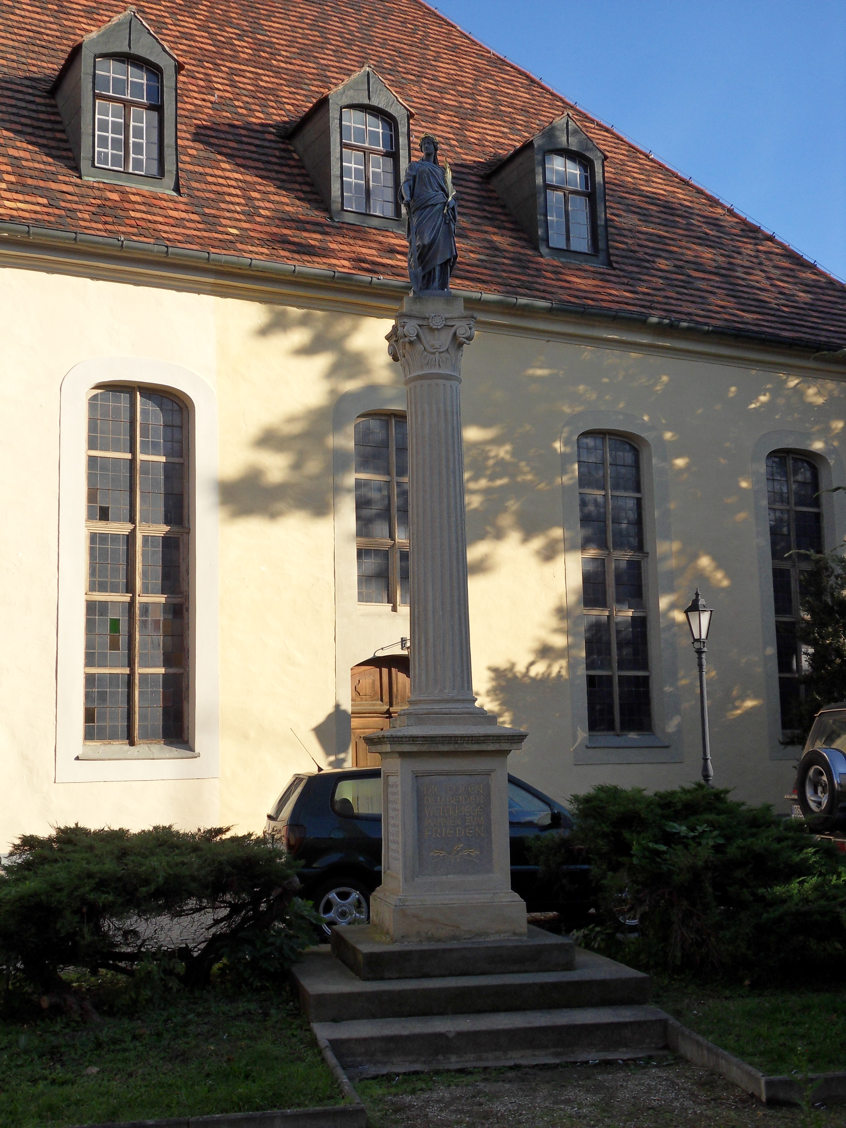 Kriegerdenkmal für den Krieg 1870/1871 in Ruhland